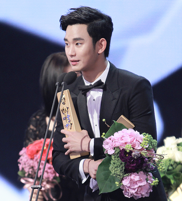 2014 백상예술대상.